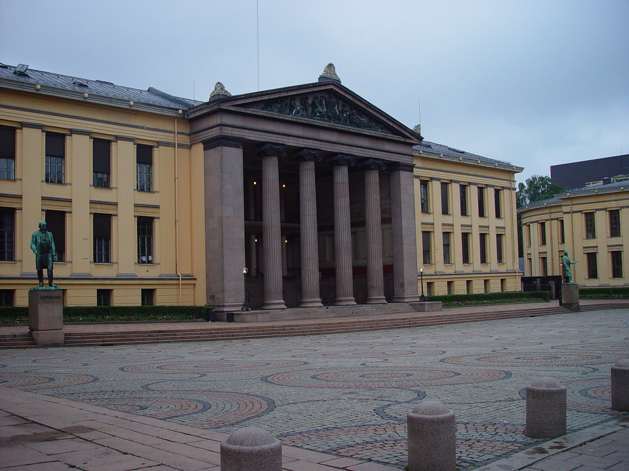 Universitetet i Oslo